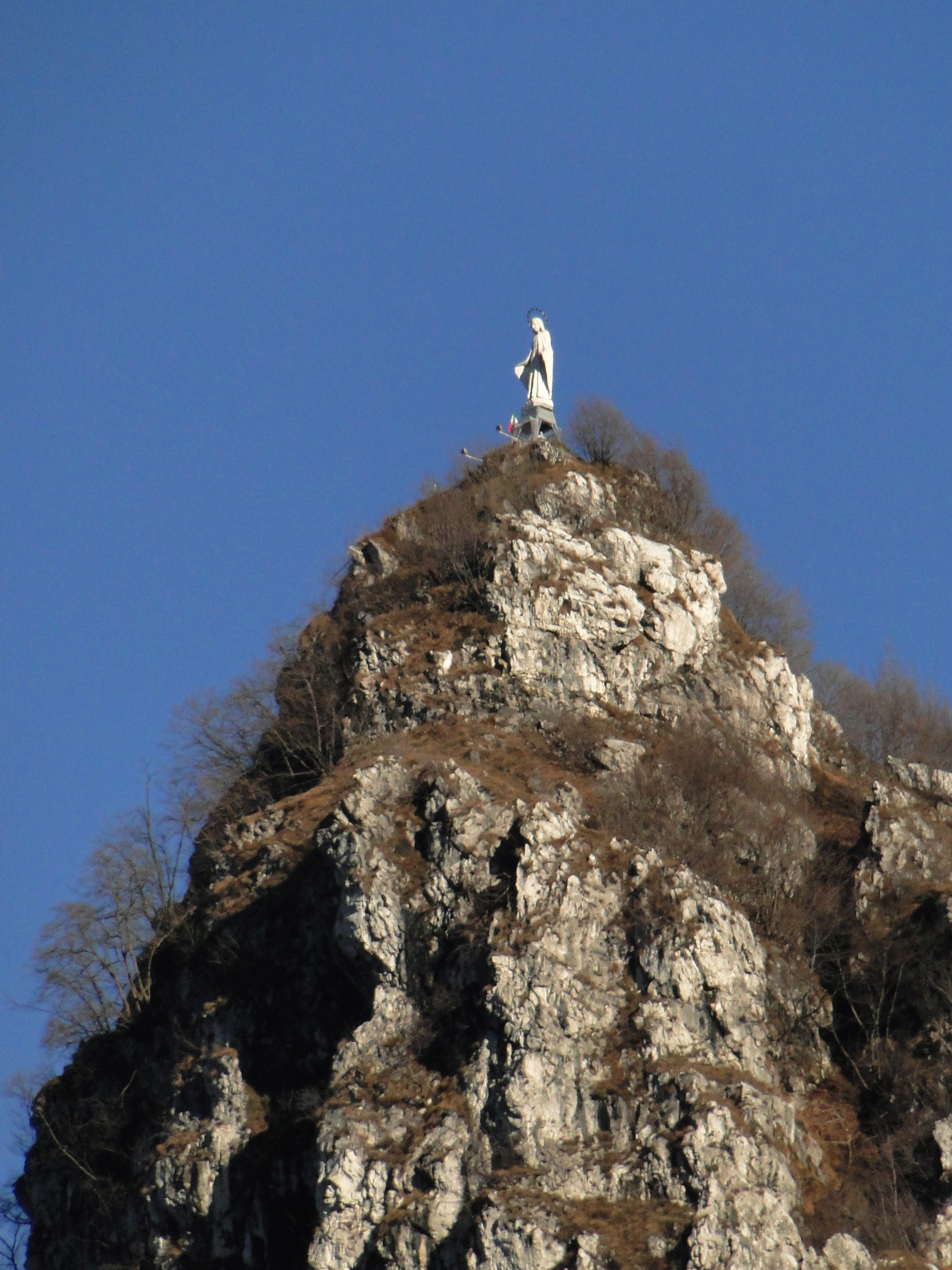 Madonna del Corno Guazza. Ponte Nossa (BG)